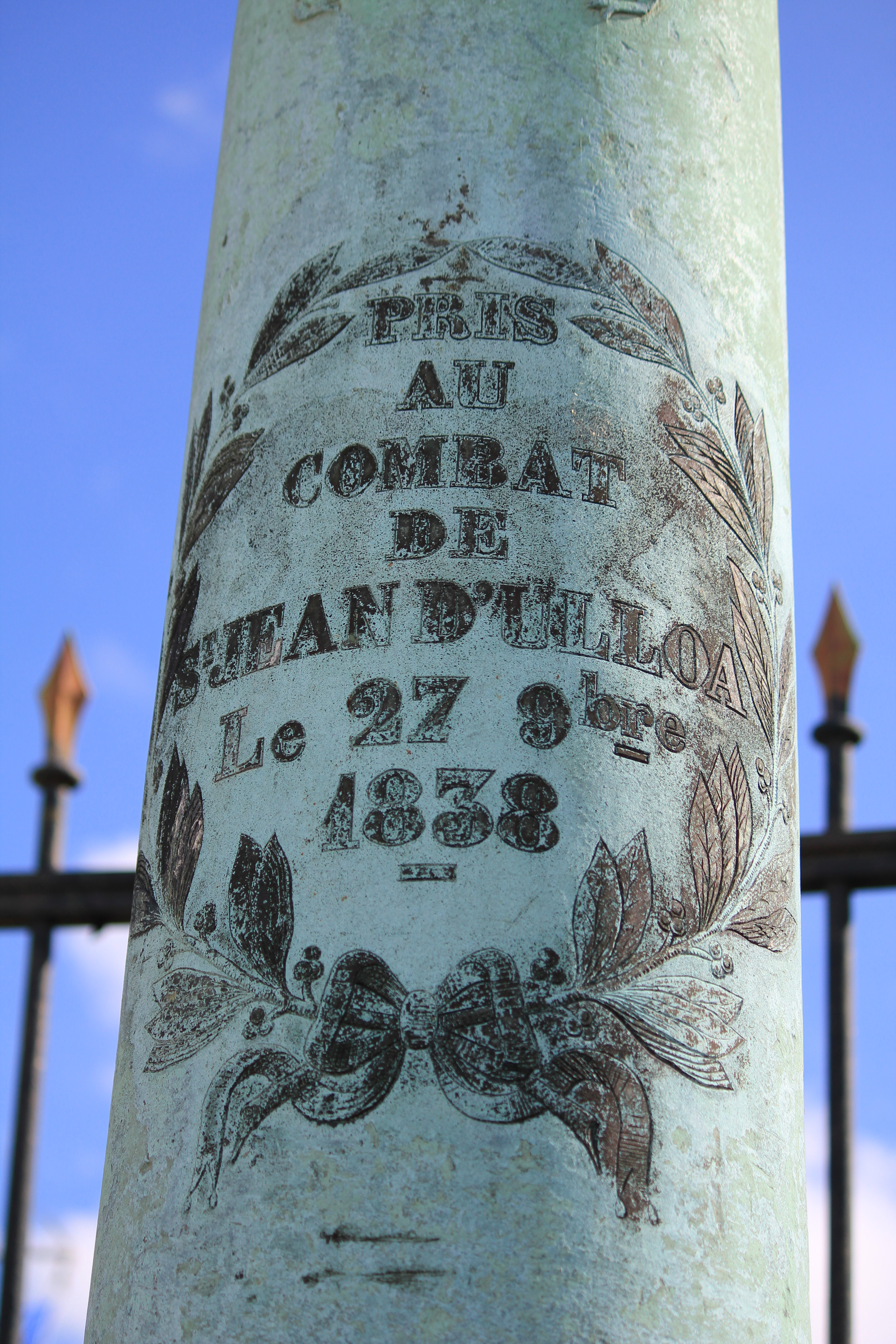 Détail d'un canon présent à l'entrée de l'Hôtel Gabriel à Lorient, et capturé à San Juan de Ulúa au Mexique en 1838 pendant la guerre des Pâtisseries